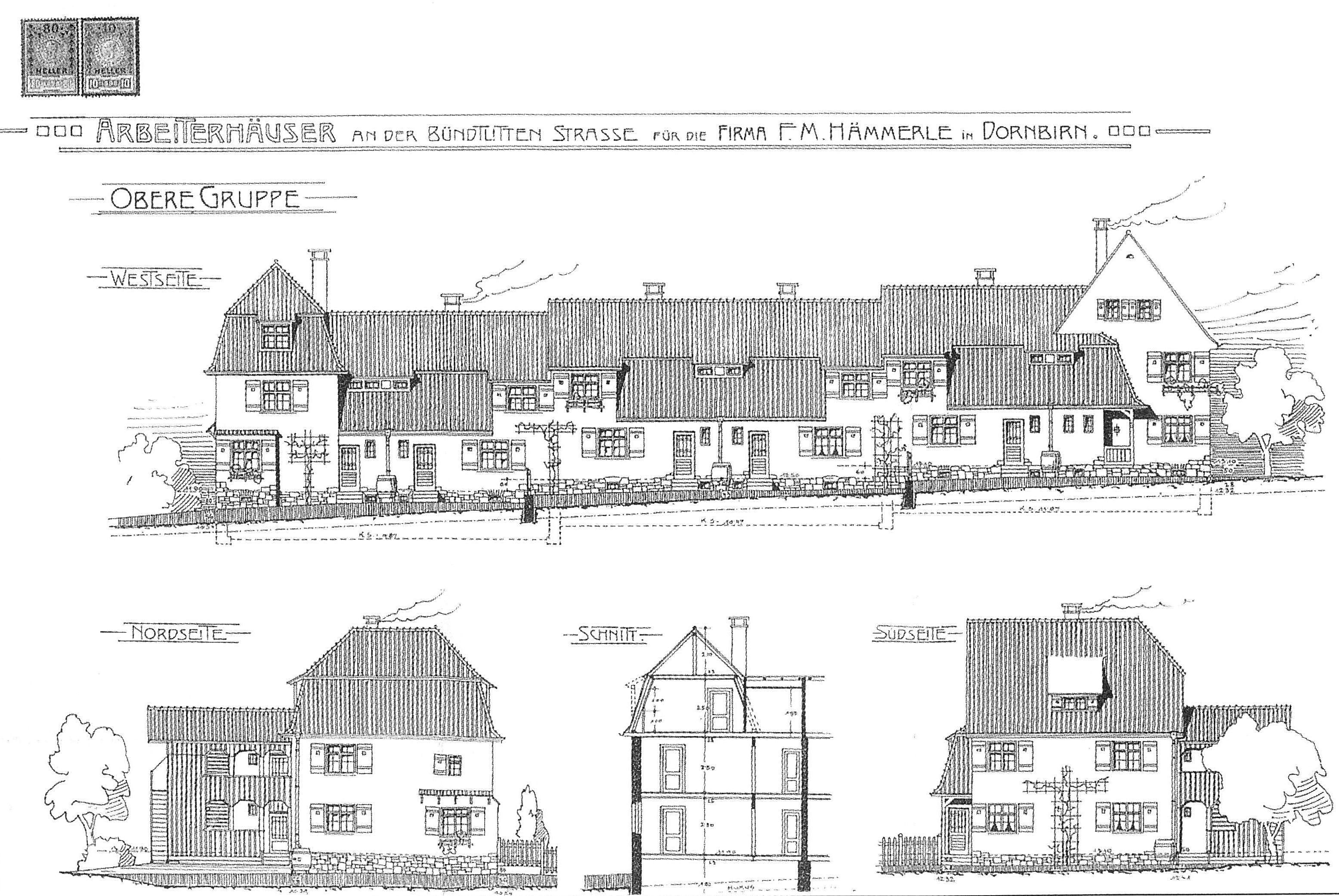 aus dem DEHIO Vorarlberg 1983: Arbeiterhäuser an der Bündtlittenstrasse Nr.12,14,16,18,20,22; und Nr.24,26,28,30,32,34; Erbaut 1907 Otto Mallaun zwei geschlossene Hausreihen, ein- zweigeschossig mit gestaffelten Firstlinien, Mansard- und Satteldächern, das untere Haus jeweils turmartig erhöht. *** für die Firma F.M.Hämmerle In Dornbirn .